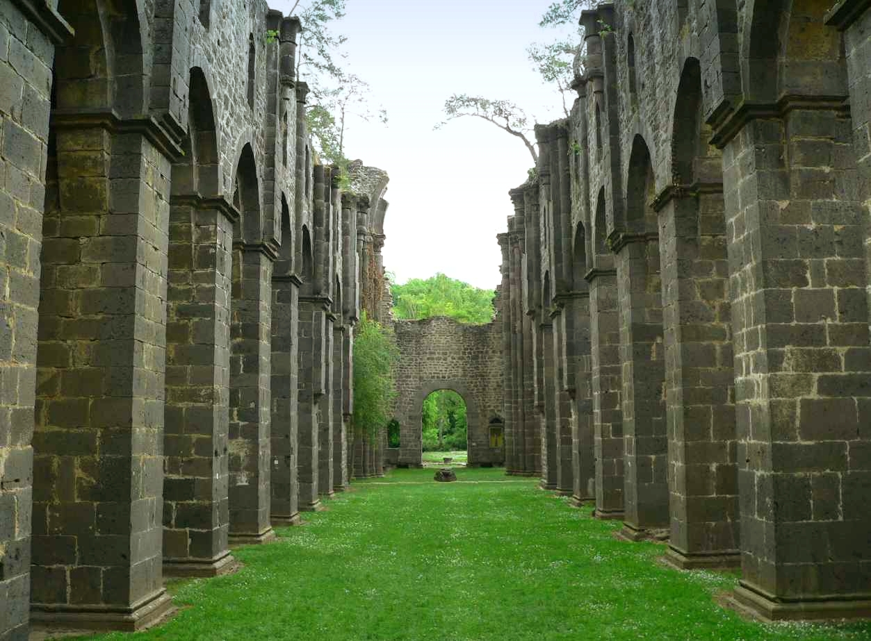 Ruine der Klosterkirche Arnsburg bei Lich, Hessen, Germany